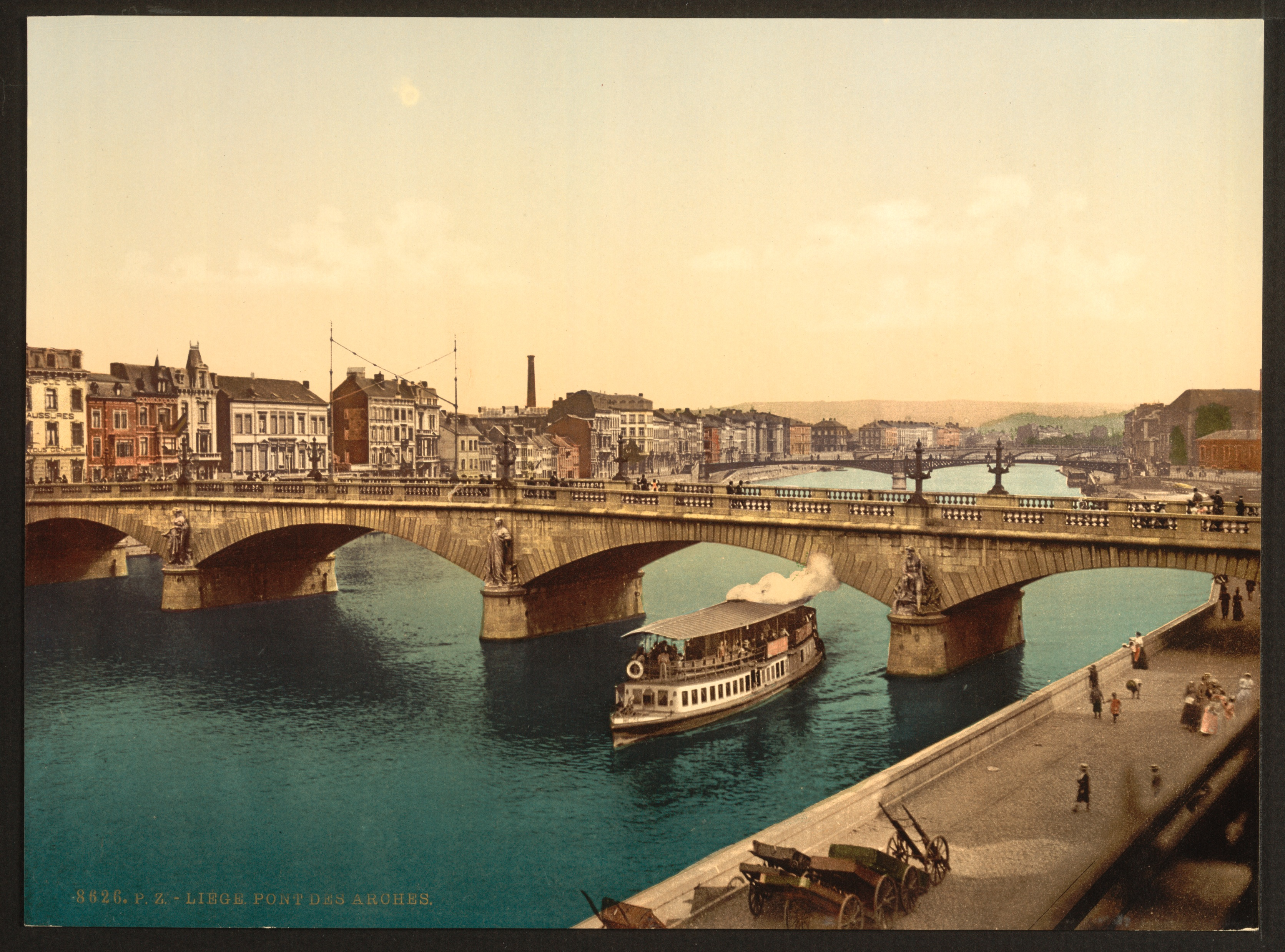 Pont des Arches, Liège, Belgique